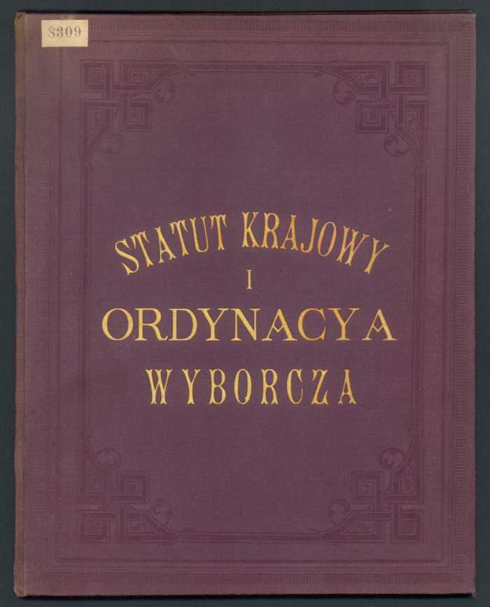 Przemiany polityczne, które nastąpiły w Cesarstwie Austriackim w latach 60–tych XIX wieku, a także starania autonomistów galicyjskich przyczyniły się do uzyskania znacznej autonomii politycznej i kulturalnej Galicji. Obok mianowanego przez Wiedeń namiestnika (odtąd już z reguły narodowości polskiej) powstały takie instytucje samorządowe, jak Sejm Krajowy i Krajowa Rada Szkolna, wyposażone w znaczne prerogatywy. W 1861 roku wprowadzono dla Galicji Statut Krajowy, określający kompetencje Sejmu Krajowego oraz ordynację wyborczą. W skład Sejmu Krajowego wchodziło: 3 arcybiskupów lwowskich (katolicki, unicki, ormiański), 5 diecezjalnych biskupów katolickich (2 przemyskich, krakowski, tarnowski i stanisławowski), rektorzy Uniwersytetu Jagiellońskiego, Uniwersytetu Lwowskiego, Politechniki Lwowskiej (od 1896 roku), prezes Akademii Umiejętności oraz posłowie z wyboru (wybierały ich następujące kurie: wielkiej własności ziemskiej, izb przemysłowo-handlowych, miast największych, gmin miejskich i wiejskich). Do kompetencji Sejmu Krajowego należało ustawodawstwo krajowe. Inicjatywę ustawodawczą mieli: rząd (namiestnik), Wydział Krajowy, komisje sejmowe oraz grupa co najmniej 15 posłów. Do 1871 roku przysługiwało Sejmowi Krajowemu prawo desygnowania posłów do izby niższej parlamentu w Wiedniu. Organem wykonawczym Sejmu Krajowego był Wydział Krajowy (jego kadencja trwała 6 lat). Przygotowywał on projekty ustaw sejmowych, reprezentował kraj przed rządem austriackim, zajmował się polityką zagraniczną i sprawował kontrolę nad samorządem terytorialnym. W jego skład wchodziło 3 członków wybranych przez Sejm Krajowy i 3 członków wybranych przez kurie. Przewodniczył mu marszałek krajowy. Miejsce: Lwów Opis: druk, jęz. polski, książka o wymiarach 297x235 mm. Autor komentarza: Zofia Czekalska-Sitko Autor fotografii: Karolina Gołąb-Malowicka